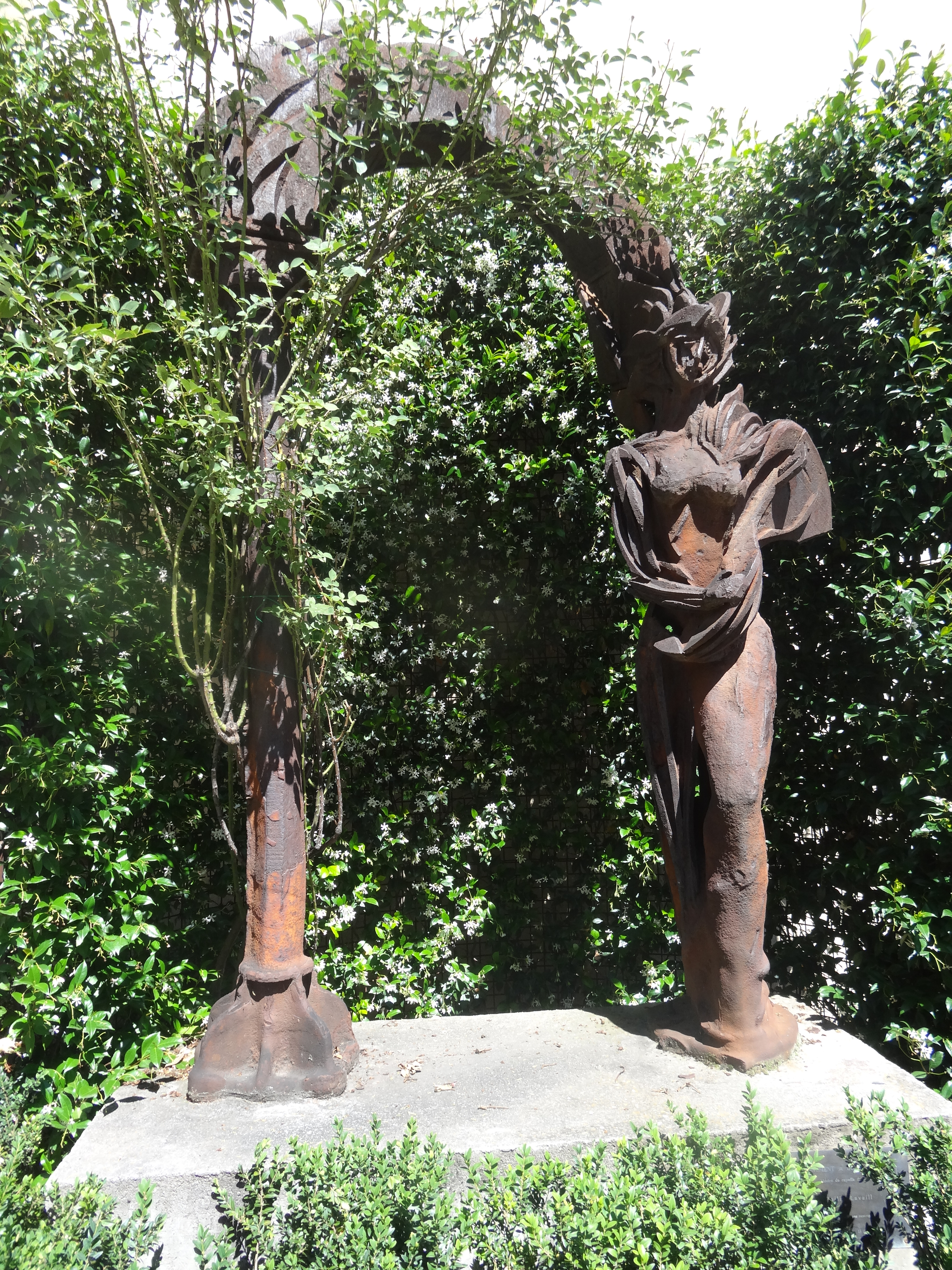 Monument a Joan Brudieu (mestre de capella del s XVI), obra de Philippe Lavaill. Inaugurat el juny 1992 a La Seu d'Urgell.